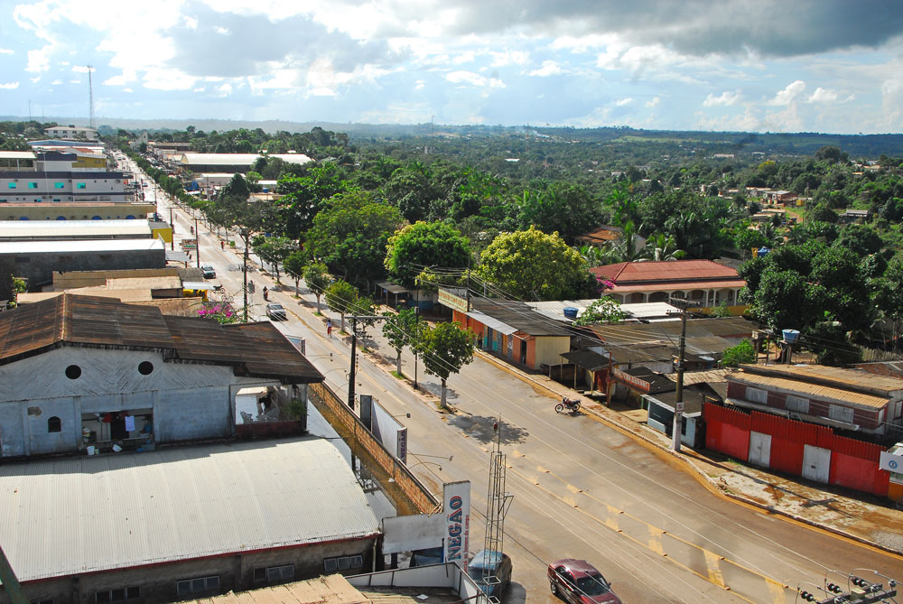 Av Santos Dumont Br 317